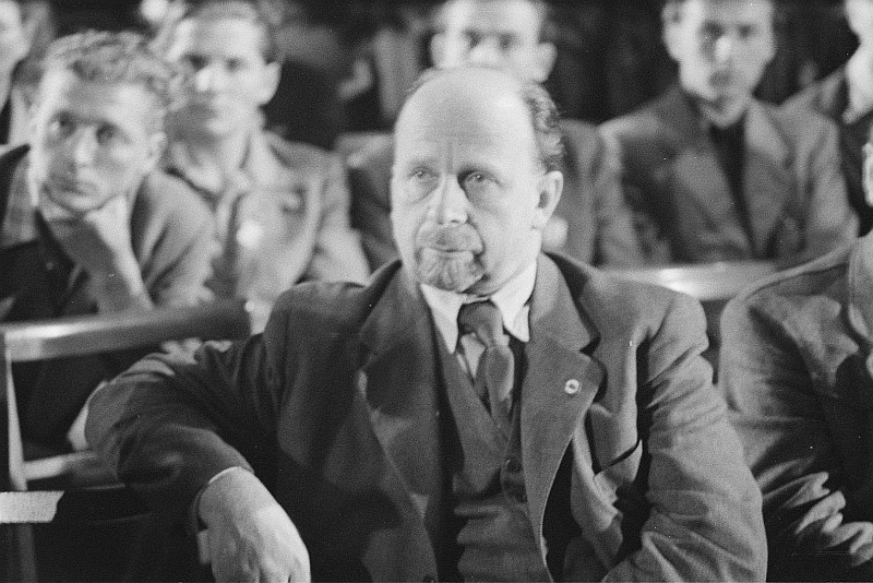 Original image description from the Deutsche Fotothek Walter Ulbricht im Publikum